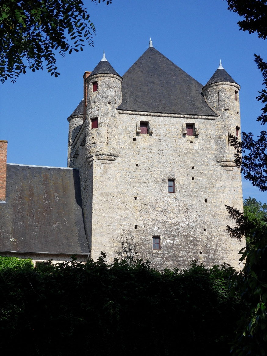 Château du Vieux Chambord (Classé) .